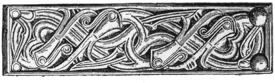 Förgyllt bronsbeslag från järnåldern, funnet på Gottland